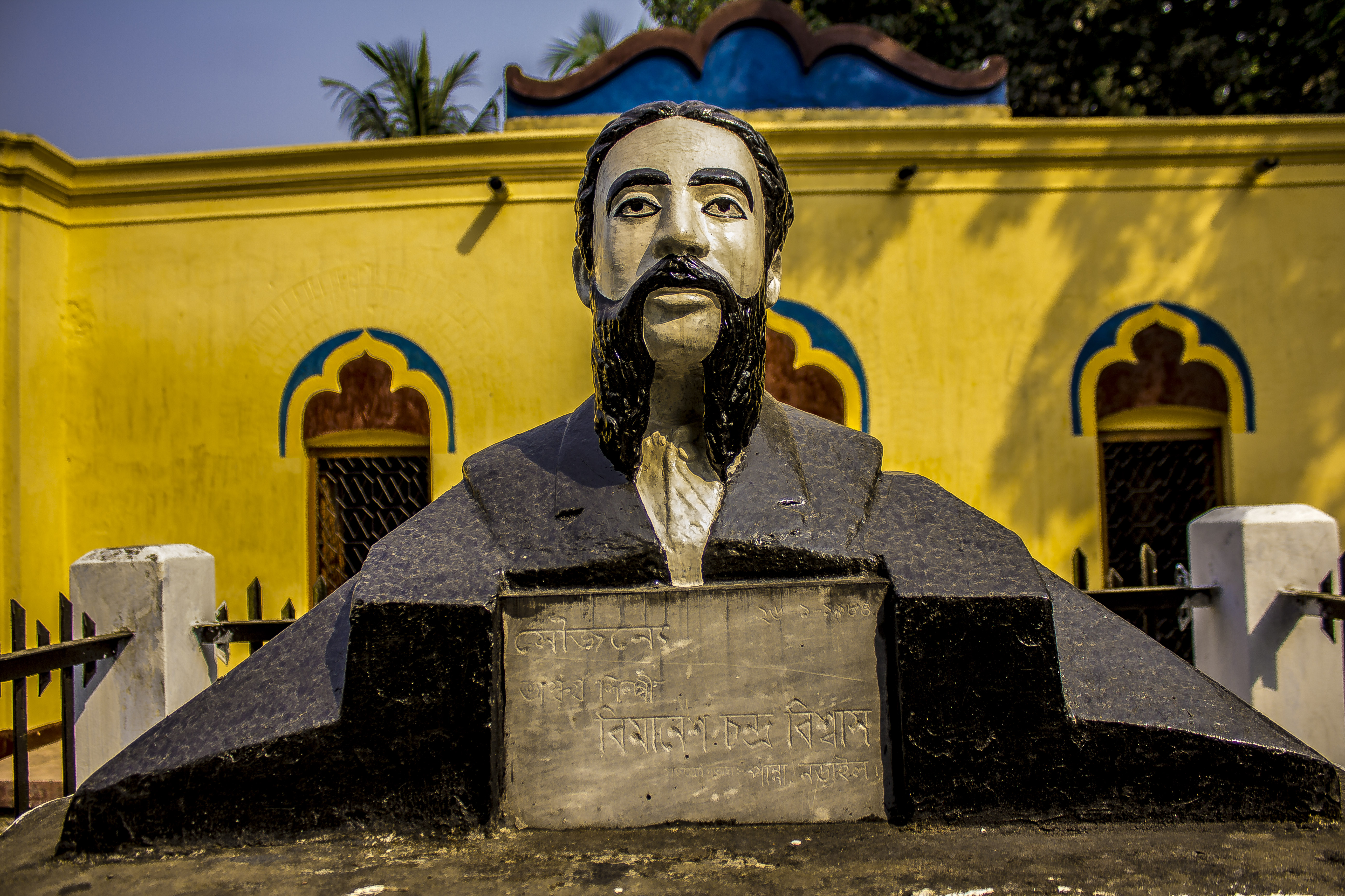 কবি মাইকেল মধুসূদন দত্তের স্মৃতি ভাস্কর্য